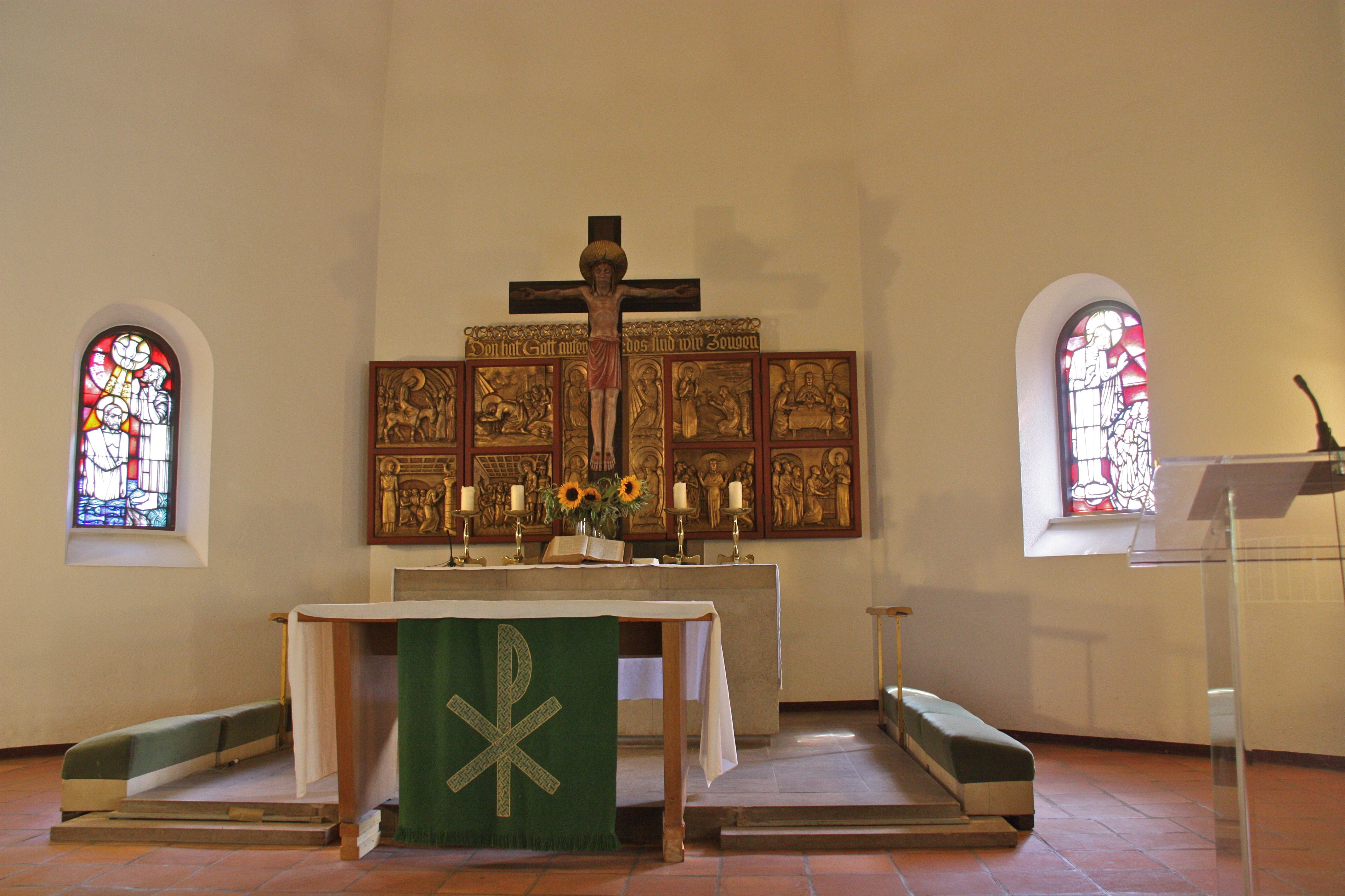 Hamburg, Fuhlsbüttel, Kirche St. Lukas, Altar